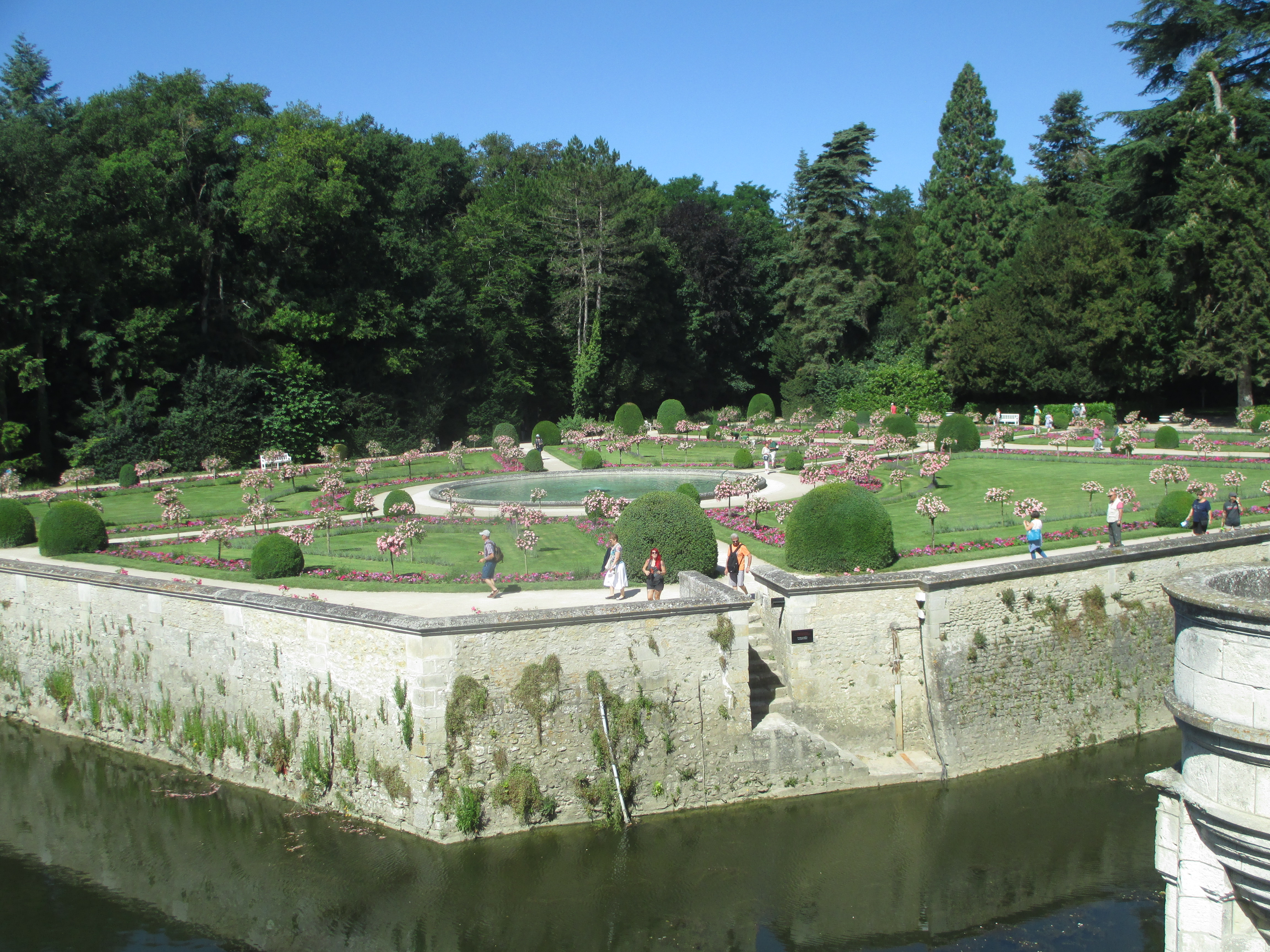 גן קתרין דה מדיצ'י בטירת שנונסו